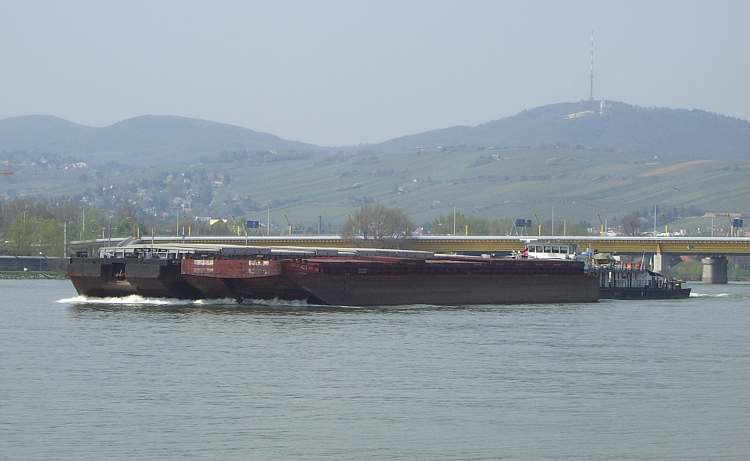 Schubverband Schubschiff Bratislava mit zwei Leichtern in Talfahrt auf der Donau (Höhe Wien).